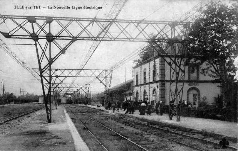 La gare d'Ille-sur-Têt avec ses nouvelles infrastructures d'électrification réalisées par la Compagnie des chemins de fer du Midi pour des essais.